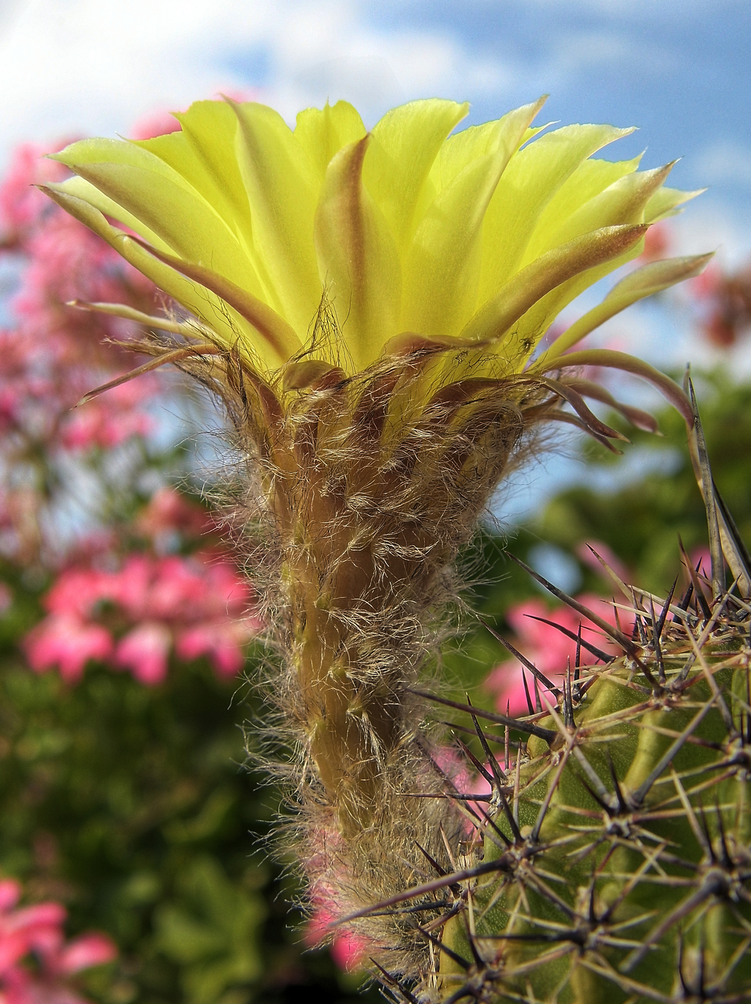 Echinopsis aurea – Blüte im Profil